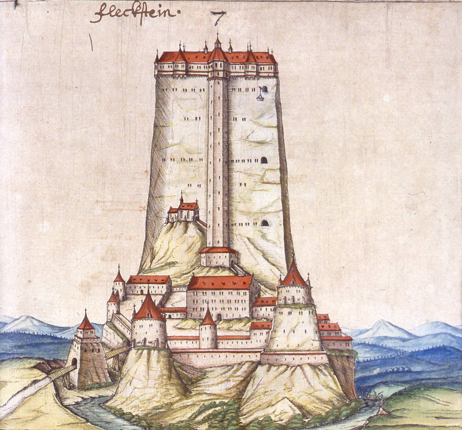 Croquis du château de Fleckenstein en 1589.